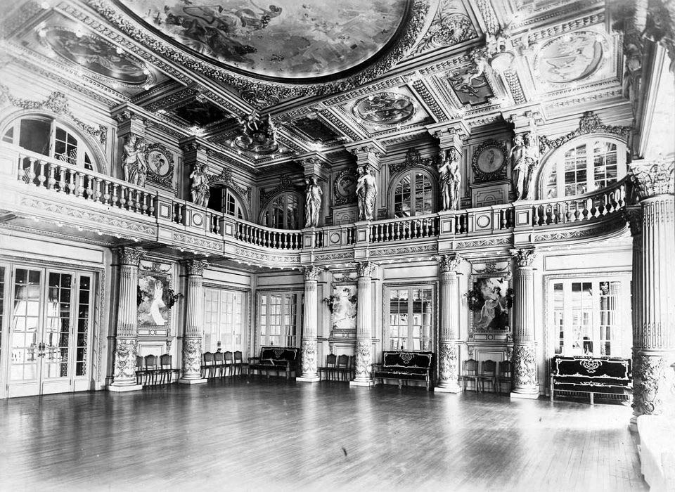 Salón de baile del Plaza Hotel (hoy Marriott) de Buenos Aires, inaugurado en 1909 y remodelado totalmente en 1934.